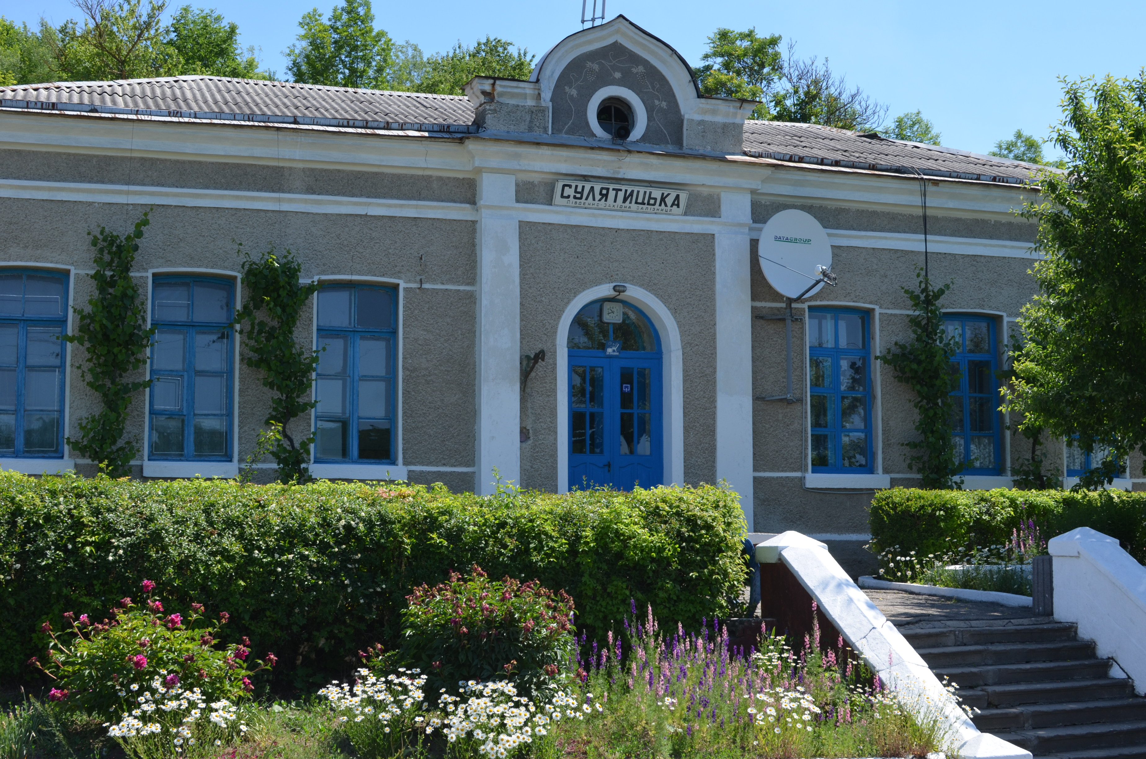 ст. Сулятицька